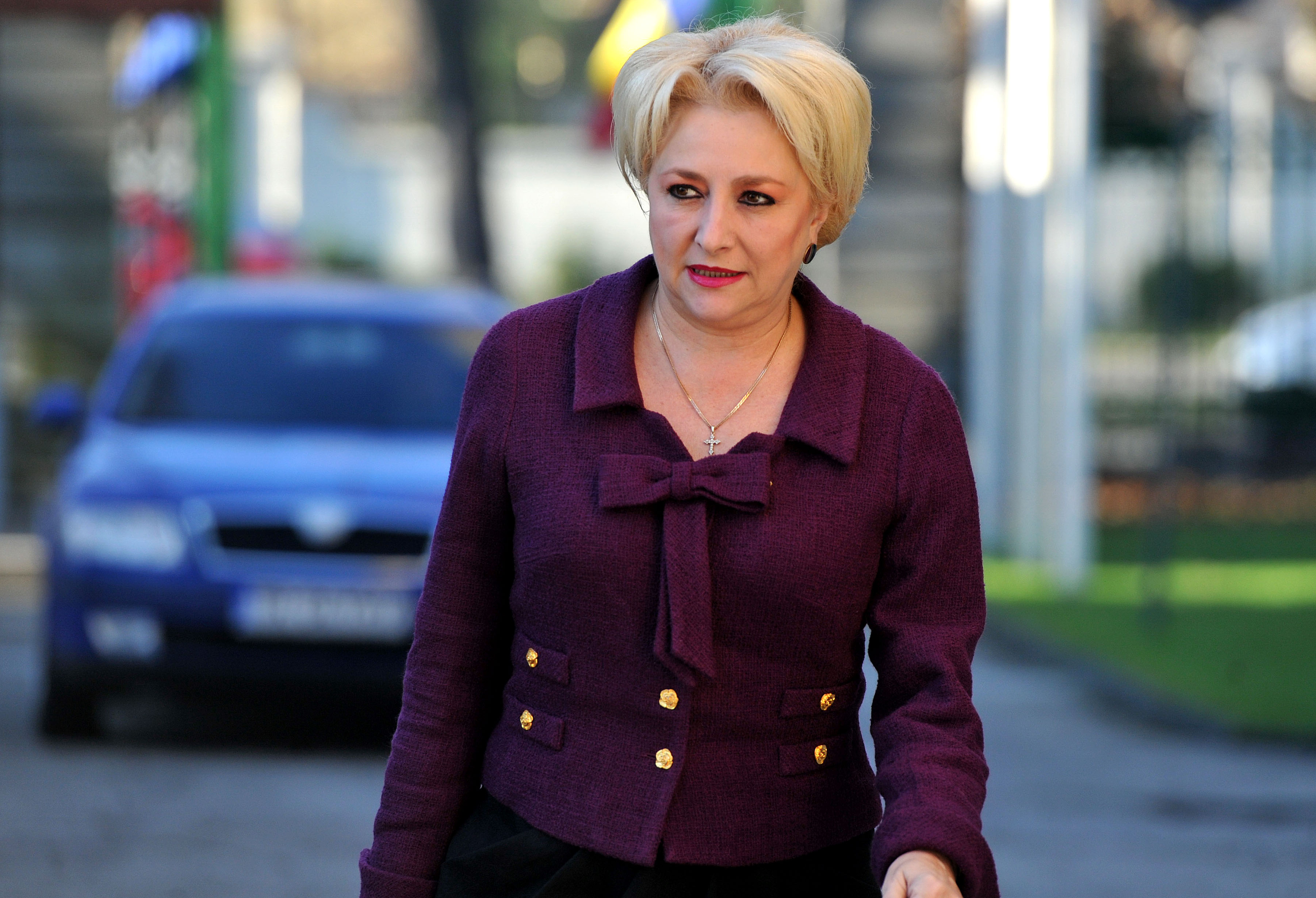 CExN al OPSD - 13.12 (1)